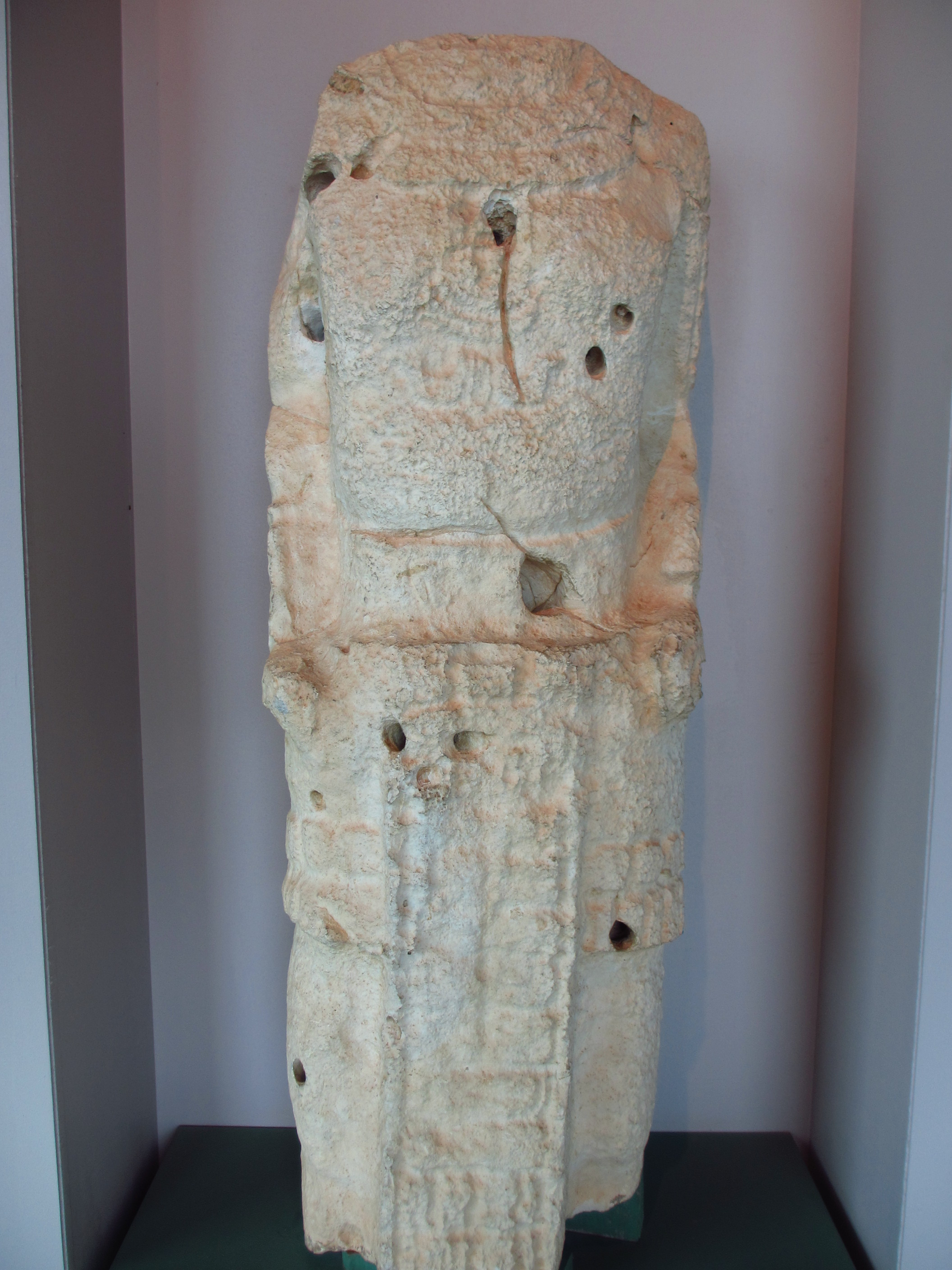 Estela 3 descubierta en la zona arqueológica de Tortuguero, Tabasco, México. Actualmente se encuentra en el Museo de Antropología Carlos Pellicer Cámara de la ciudad de Villahermosa, Tabasco, México. Escultura elaborada en piedra caliza, carece de cabeza y de una parte de las extremidades inferiores. Muestra a un hombre importante, quizas un gobernante, colocado de pie y ricamente ataviado.